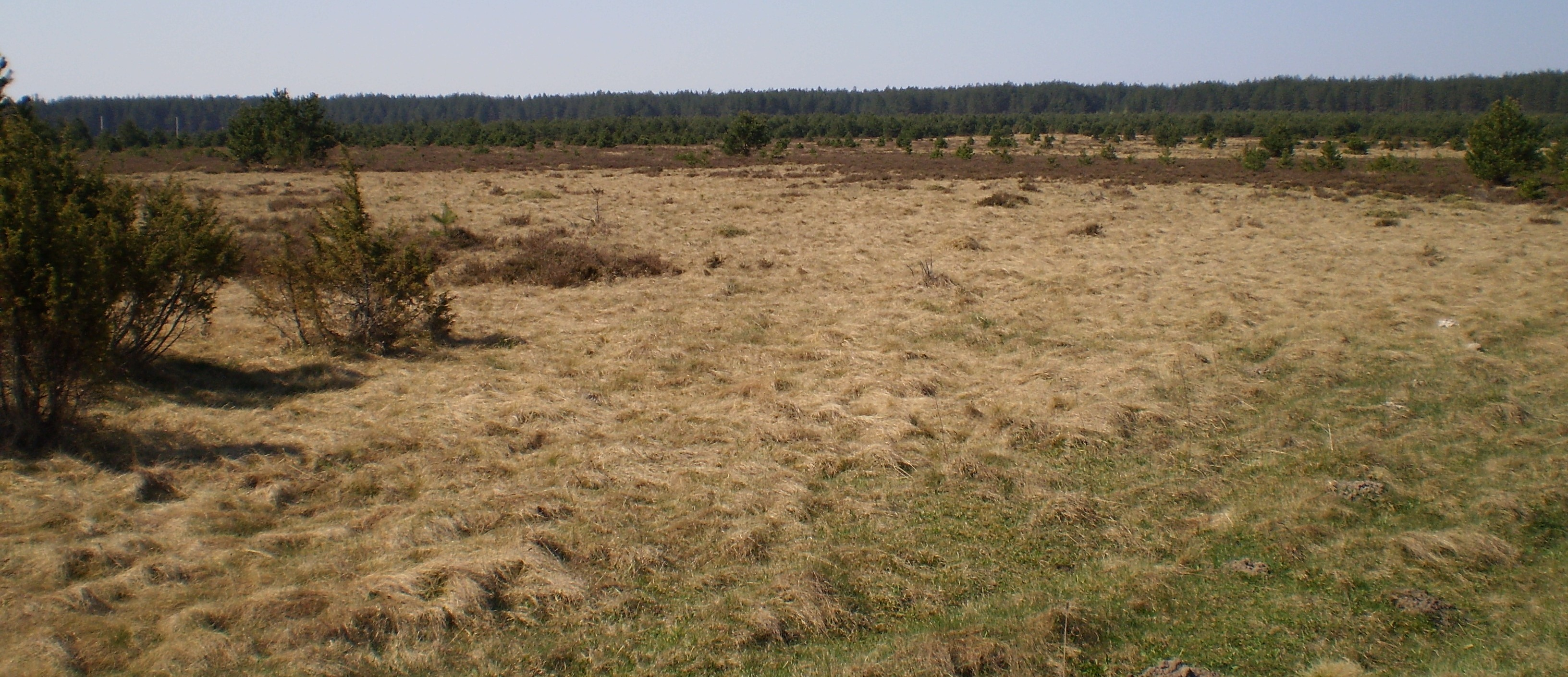 Бегомльский аэродром